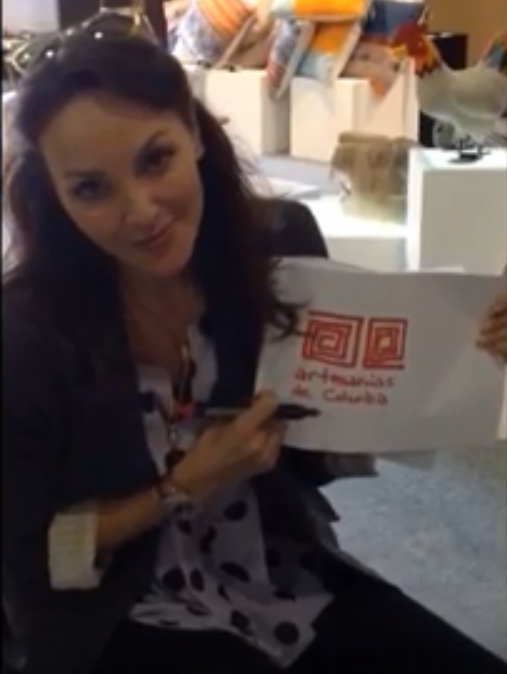 Carolina Gómez en un vídeo de apoyo a las Artesanías de Colombia